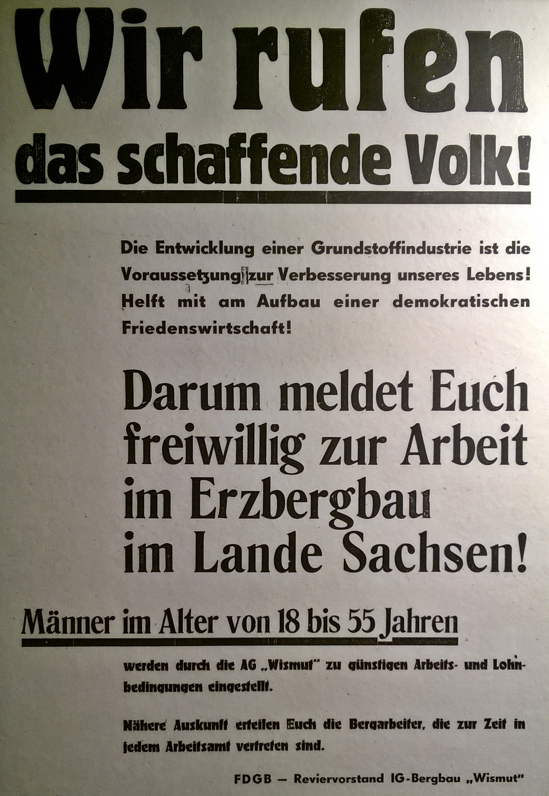 Werbeaufruf für die Arbeit im Uranbergbau des Unternehmens Wismut in Sachsen. Das Plakat stammt vermutlich aus der Zeit Ende der 1940er Jahre.